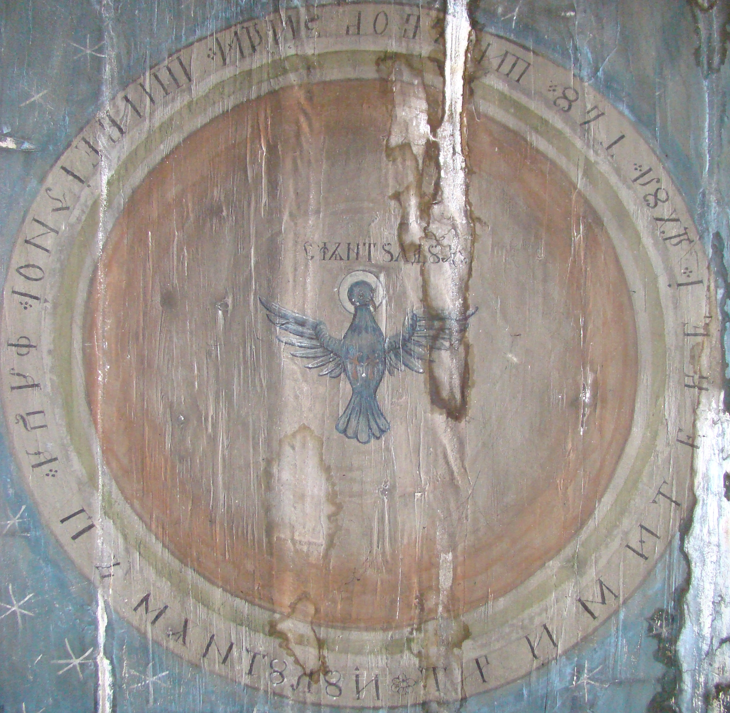 Biserica de lemn „Cuvioasa Paraschiva” din Rădulești